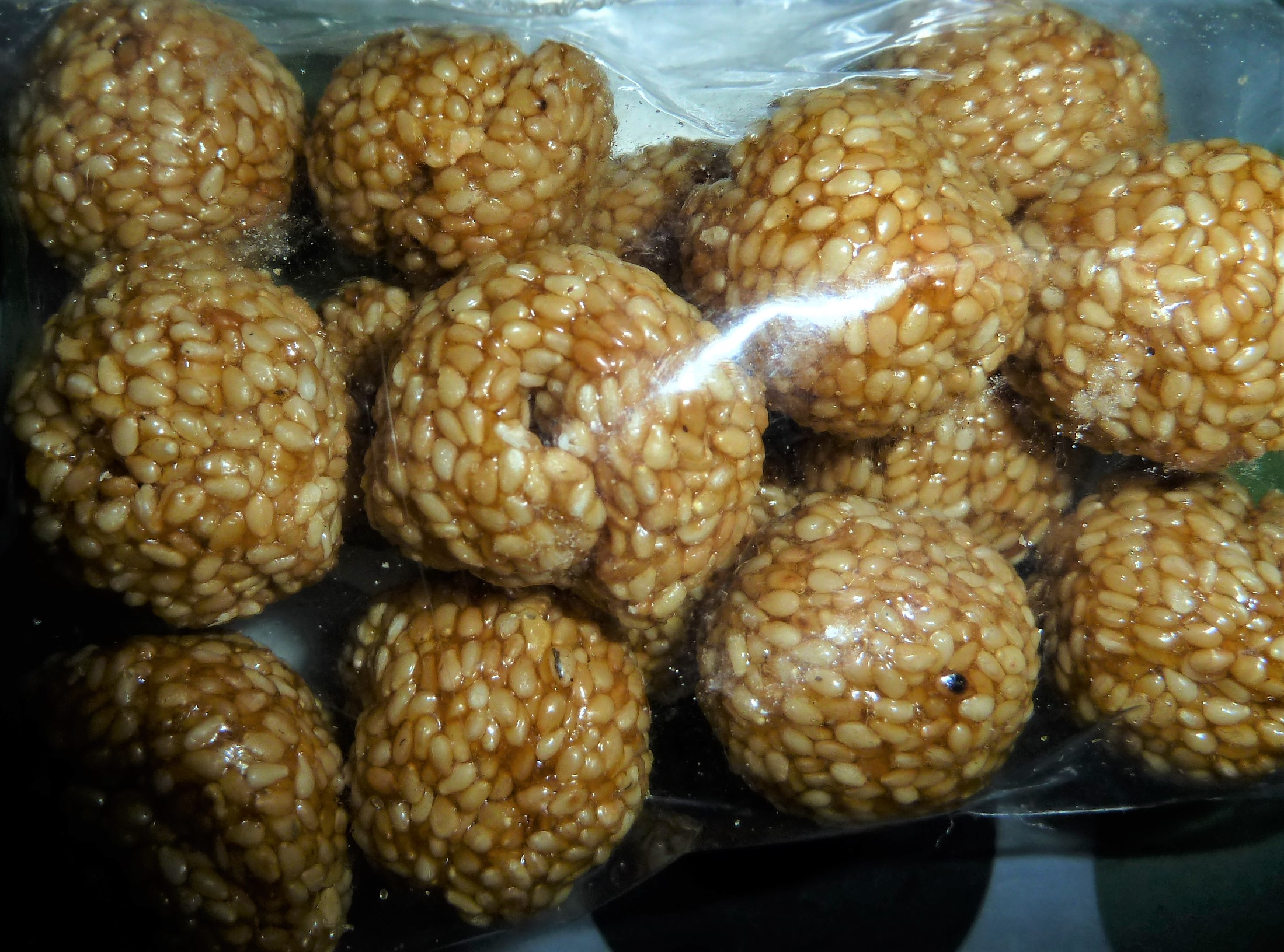 నువ్వులు ఉండలు